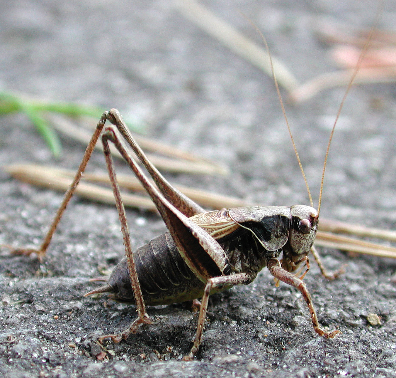 Pholidoptera griseoaptera, m., dark bush cricket, Gewöhnliche Strauchschrecke, Elbmarsch bei Hamburg, Deutschland